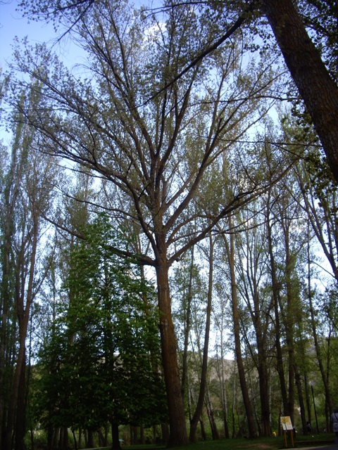 Imagen tomada en el Sotoplaya (Soria) el 14 de mayo de 2012. Se observa el chopo objeto de protección especialpor el Catálogo de Especímenes Vegetales de Singular Relevancia de Castilla y León (DECRETO 63/2003, de 22 de mayo).